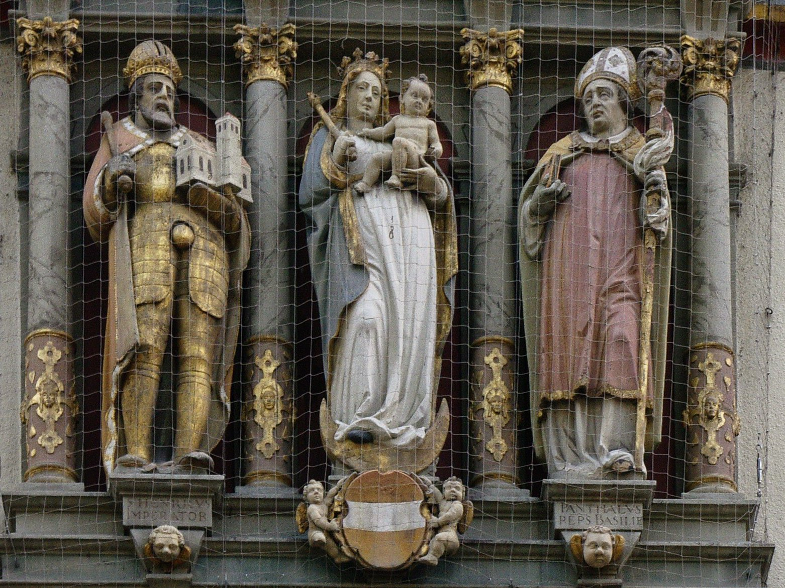 Die drei Stadtheiligen Basels am Basler Hof in Freiburg i. Br. (Von links: Kaiser Heinrich II, Maria, Hl. Pantalus)